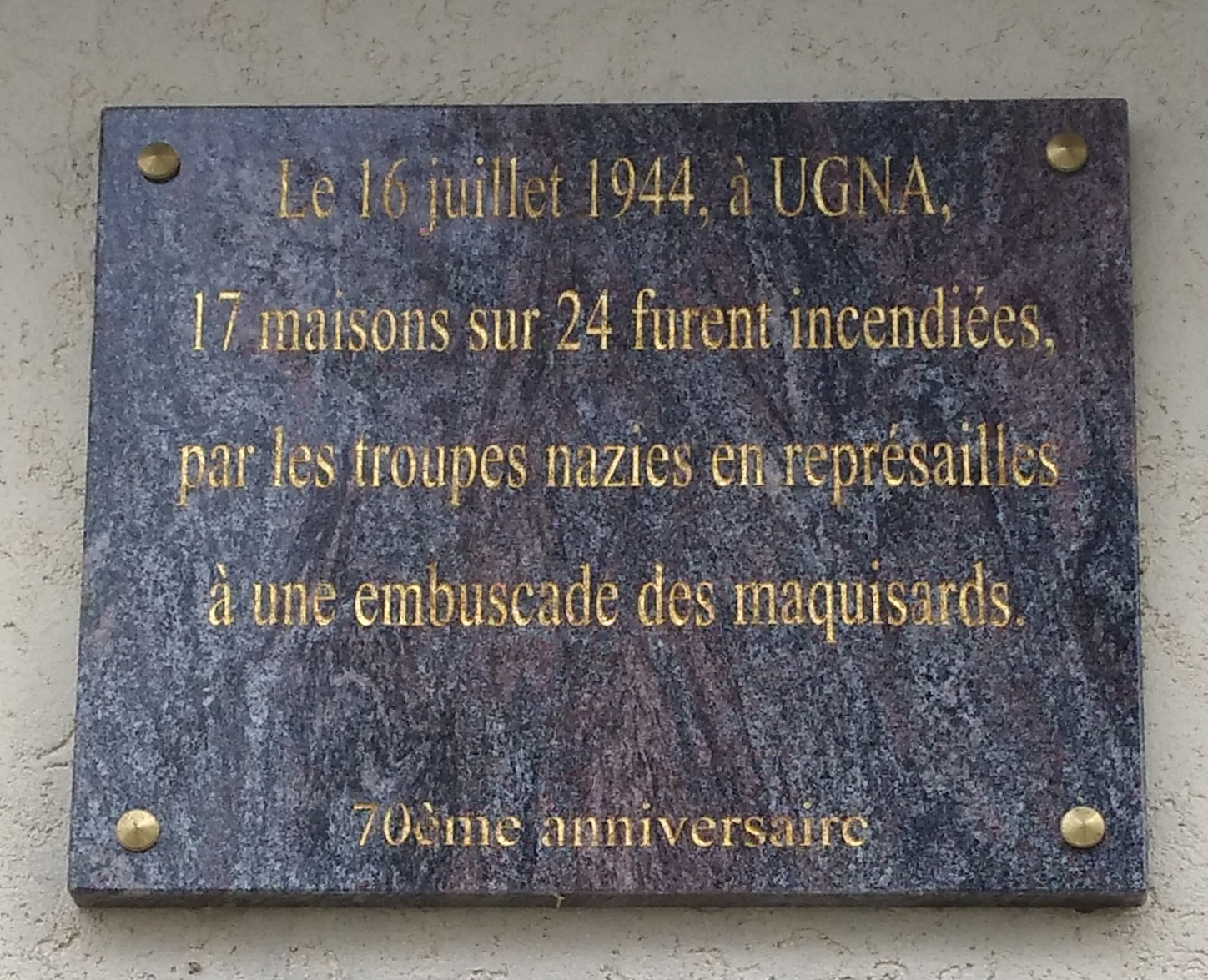 Plaque commémorative du 70e anniversaire de l'incendie d'Ugna, sur la commune de Savigna (Valzin en Petite Montagne, Jura, France).